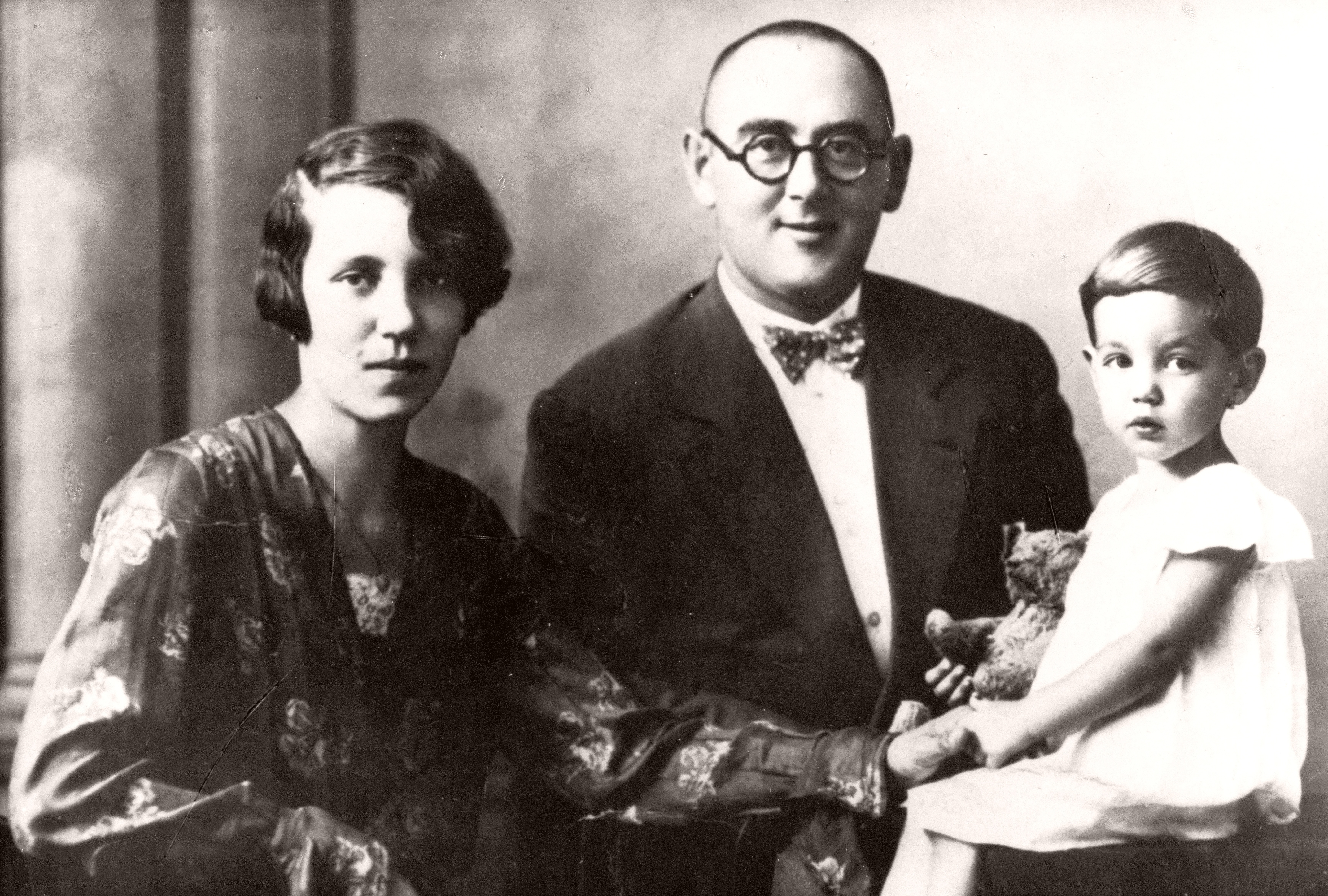 Nagy Imre későbbi miniszterelnök feleségével és kislányuk Erzsébet. Location: Hungary, Decs Tags: family, celebrity Title: Nagy Imre későbbi miniszterelnök feleségével és kislányuk Erzsébet.